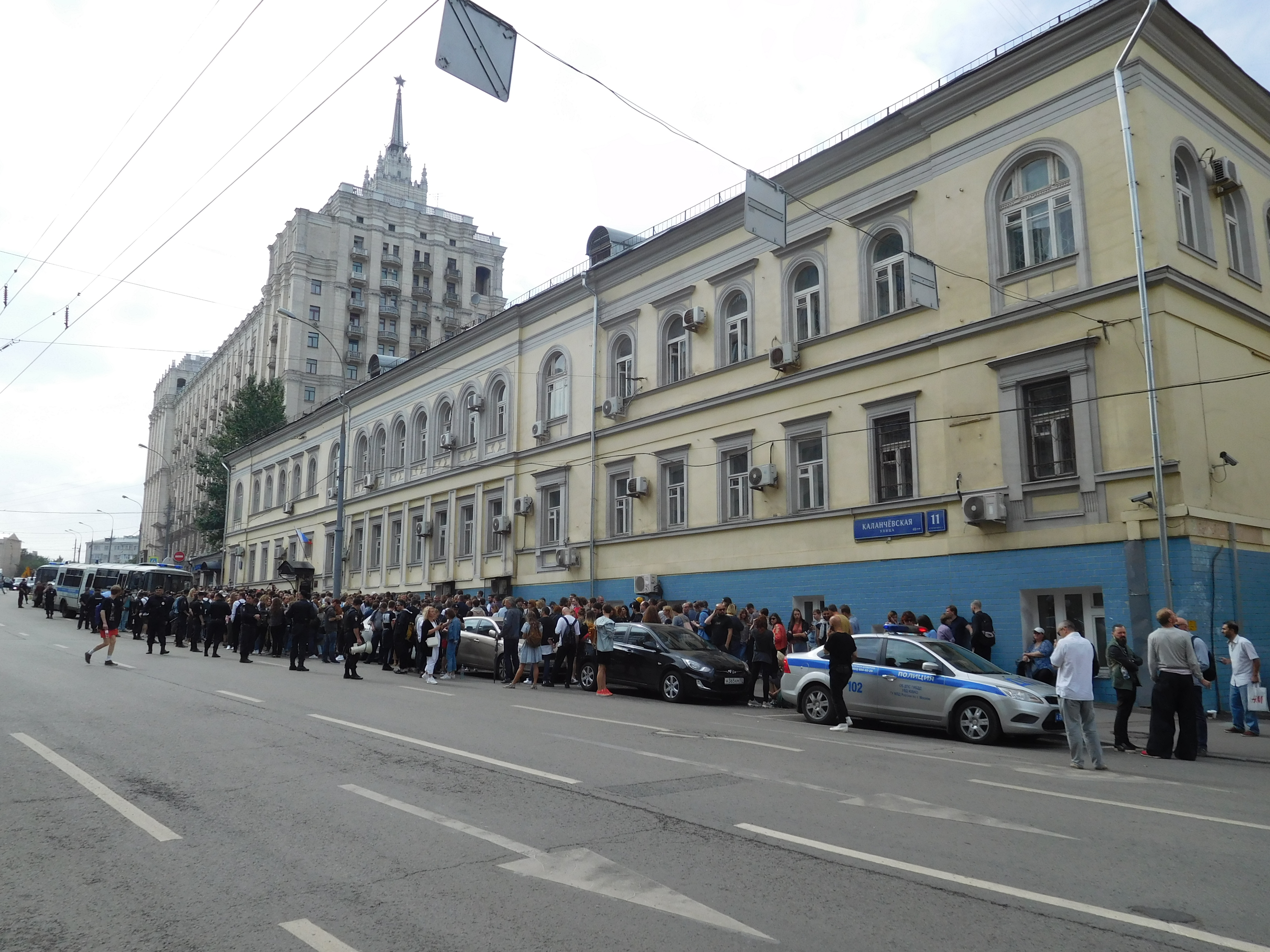 Арест Кирилла Серебренникова, перекрыта Каланчёвская улица